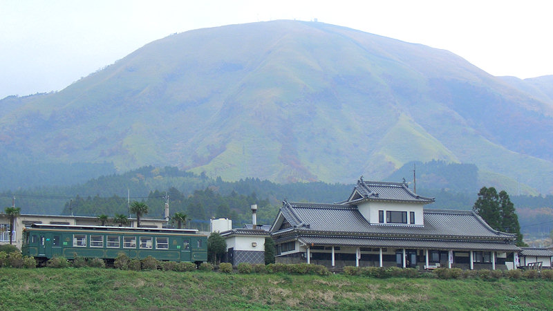 南阿蘇鉄道 阿蘇下田城ふれあい温泉駅 裏側から撮影 左手が立野駅方面、右手が高森駅方面。 奥に聳える山は夜峰山 撮影者/著作者/著作権保有者 : MK Products (本人がアップロード) 撮影日 : 2006/11/21 阿蘇下田城ふれあい温泉駅用にアップロードした画像です。良い画像があれば別の画像に変えてください。